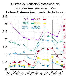 Curvas de variación estacional del estero Catemu en puente Santa Rosa. # Dirección General de Aguas # Diagnóstico y clasificación de los cursos y cuerpos de agua según objetivos de calidad. Cuenca del río Aconcagua. # Santiago de Chile # Ministerio de Obras Públicas (Chile) # 2004 # url: # urlarchivo: # Tabla 4.9: Estero Catemu en puente Santa Rosa pág. 58 mes 5% 10% 20% 50% 85% 95% abr 3.098 1.846 1.023 0.405 0.219 0.190 may 2.686 1.752 1.079 0.499 0.283 0.241 jun 2.410 1.616 1.027 0.498 0.288 0.245 jul 2.132 1.613 1.151 0.603 0.272 0.171 ago 1.981 1.284 0.789 0.371 0.221 0.193 sep 2.051 1.232 0.683 0.260 0.126 0.105 oct 1.933 1.776 1.586 1.222 0.774 0.511 nov 2.493 2.247 1.949 1.380 0.678 0.267 dic 2.462 2.216 1.919 1.351 0.651 0.240 ene 2.328 2.124 1.876 1.402 0.819 0.477 feb 2.191 1.792 1.405 0.883 0.498 0.356 mar 2.906 1.877 1.141 0.514 0.285 0.242 This plot was created with Gnuplot.